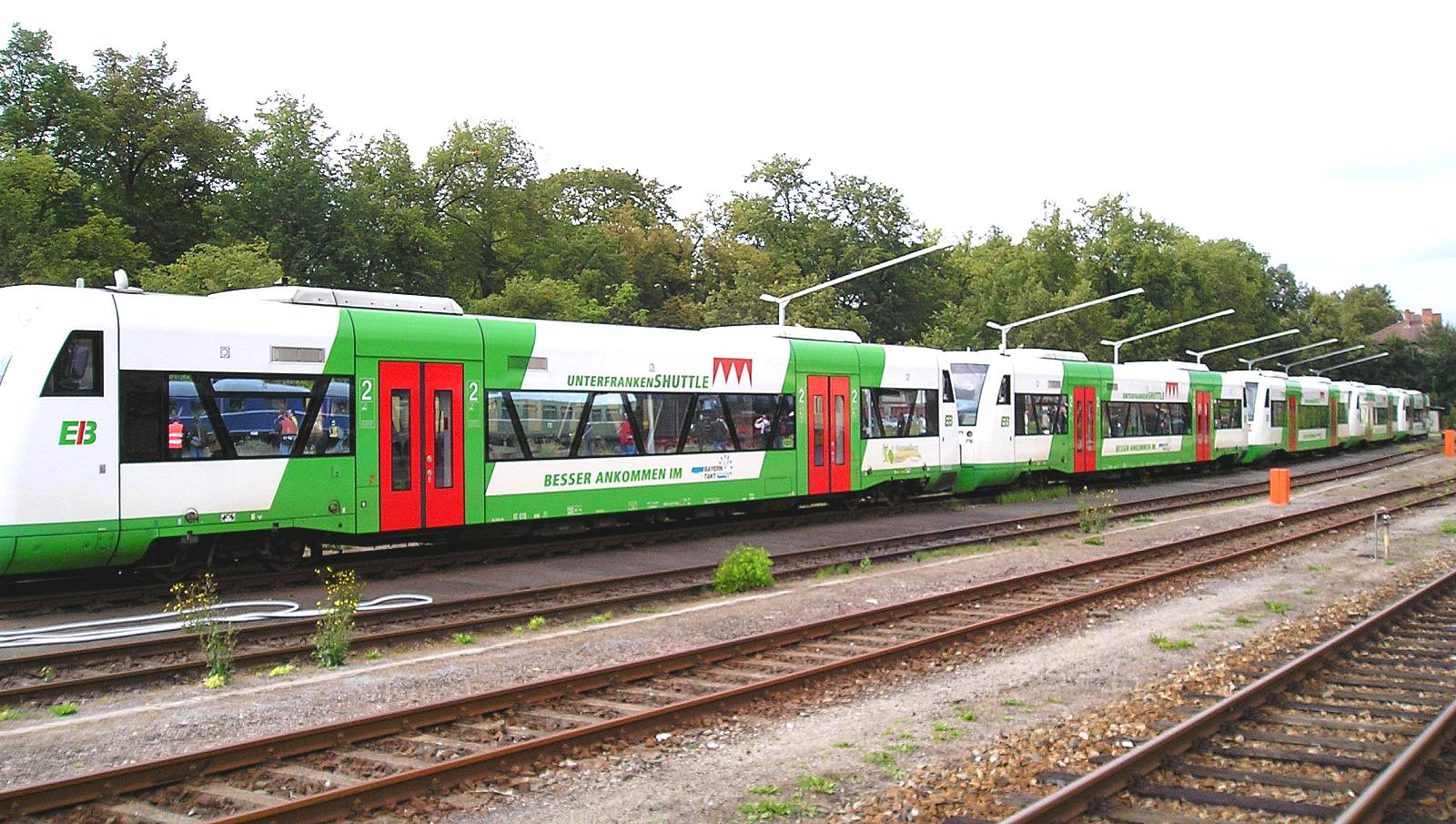 Abgestellte Unterfranken-Shuttle im bayerischen Teil vom Bahnhof Meiningen